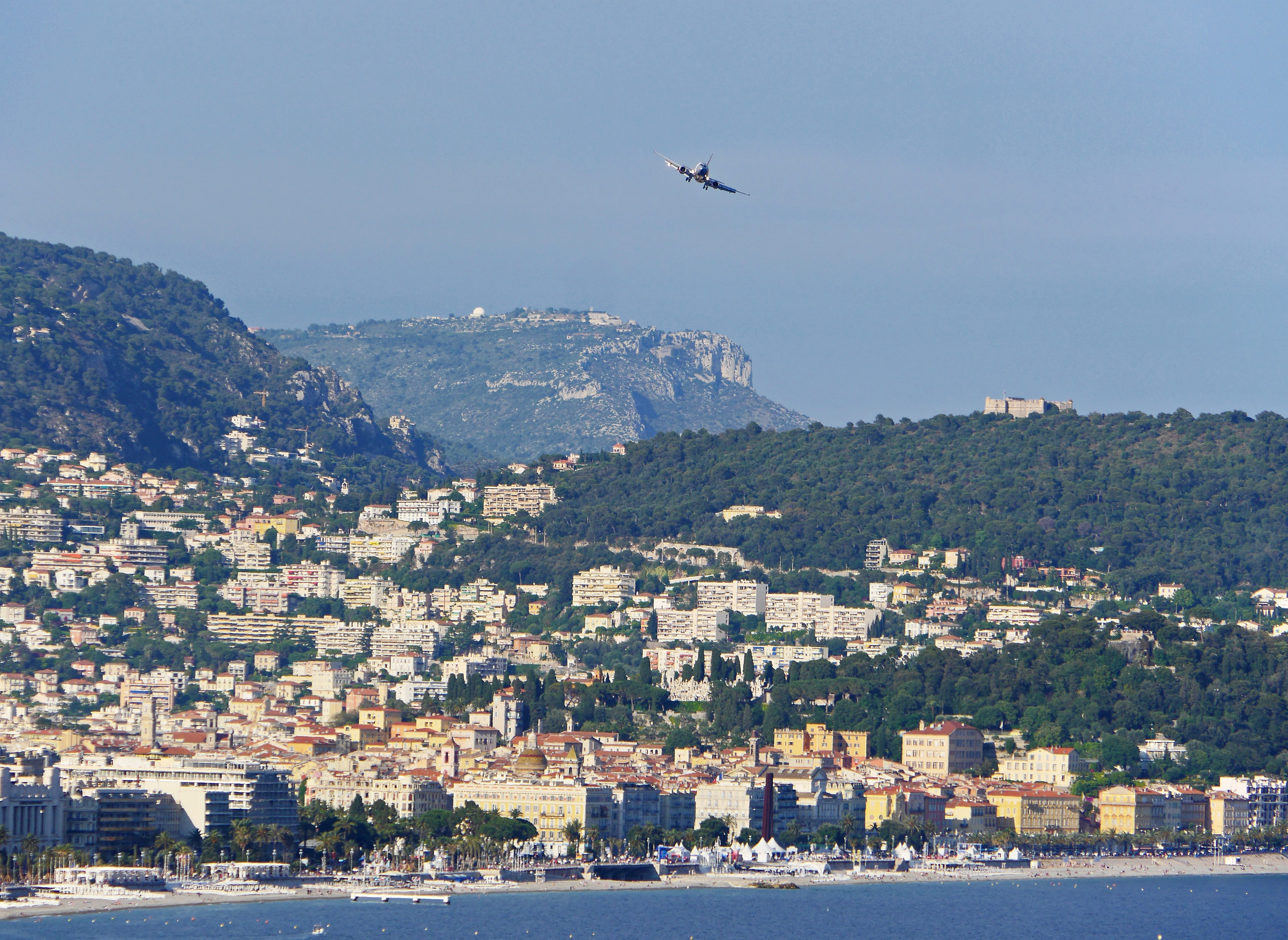 Вид на Ниццу с воздуха